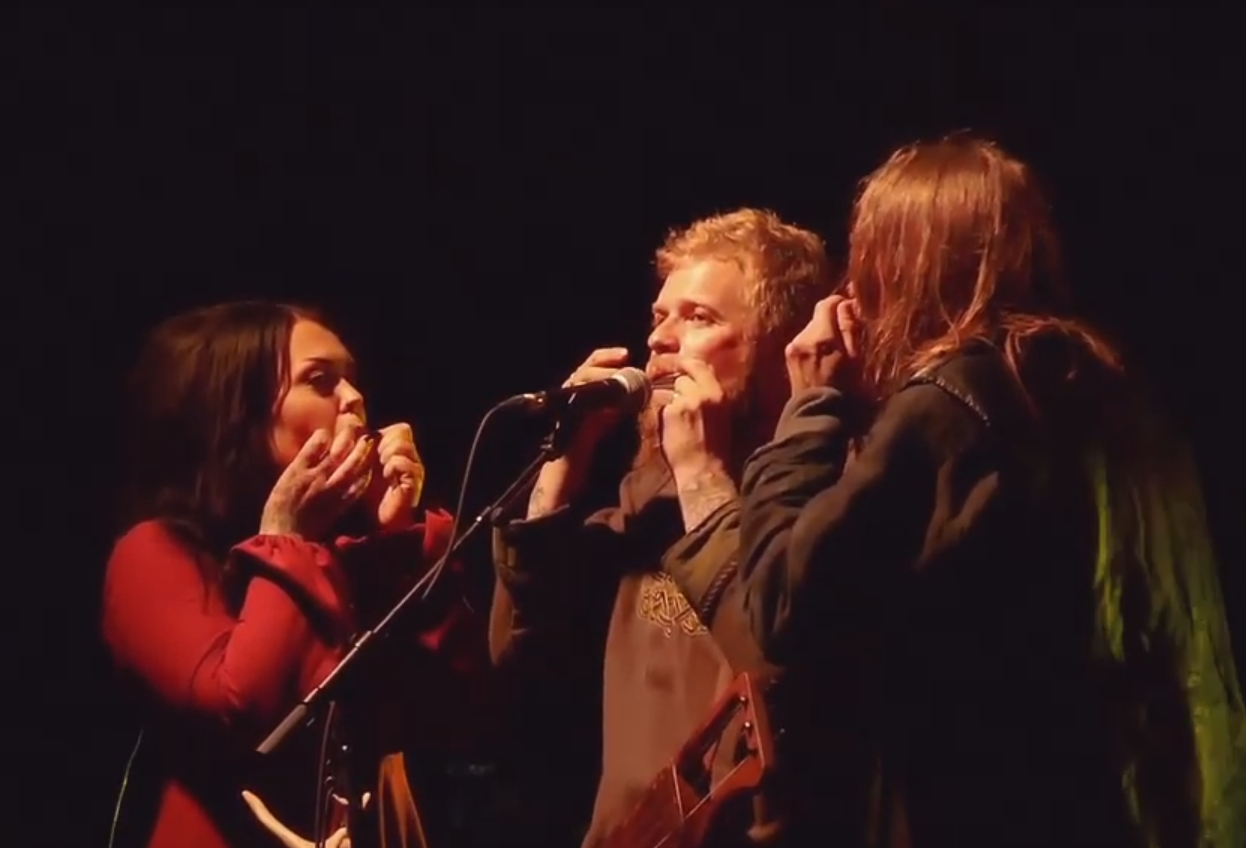 le groupe de néo-folk, Skáld au Samar'ock en 2019.